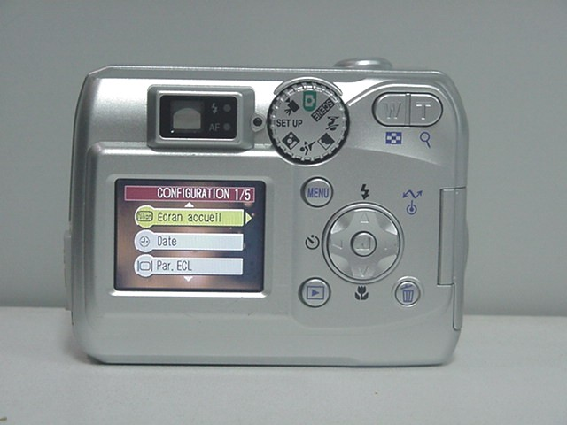 Appareil photographique numérique Nikon Coolpix 2200 - Vue arrière